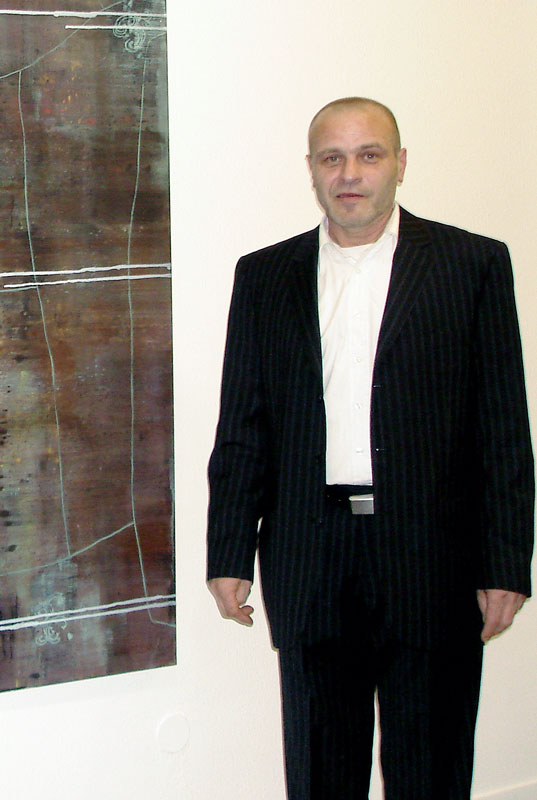 Porträt des Maler und Bildhauer Adochi